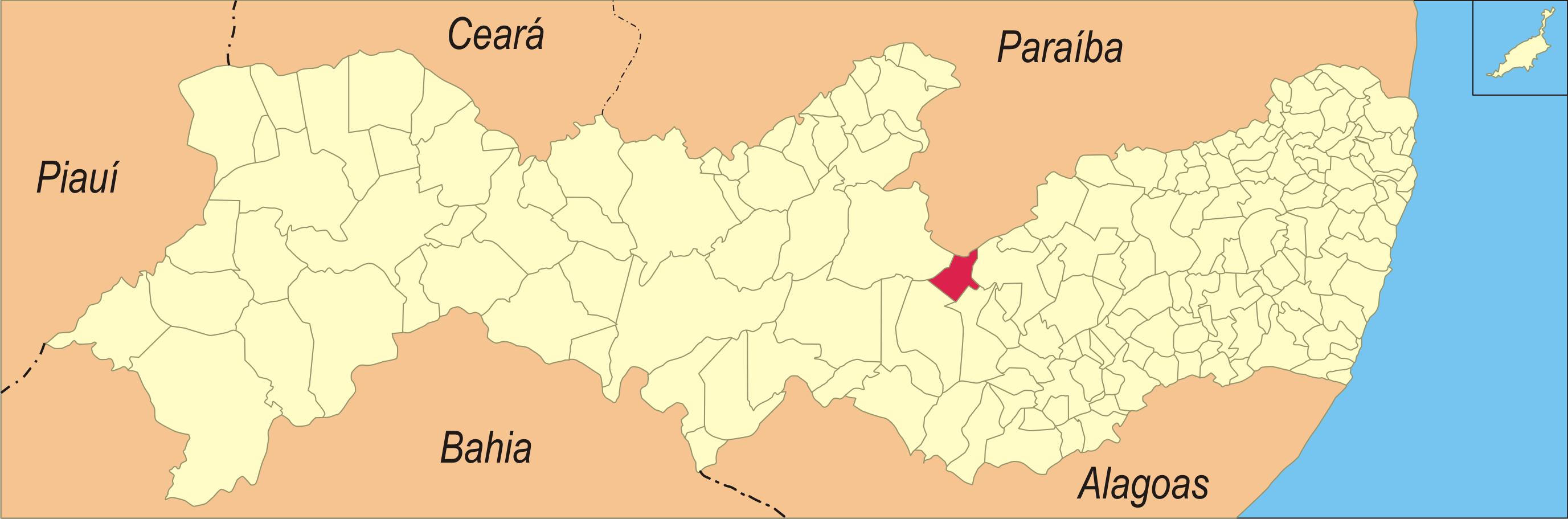 Localização da cidade no estado de Pernambuco